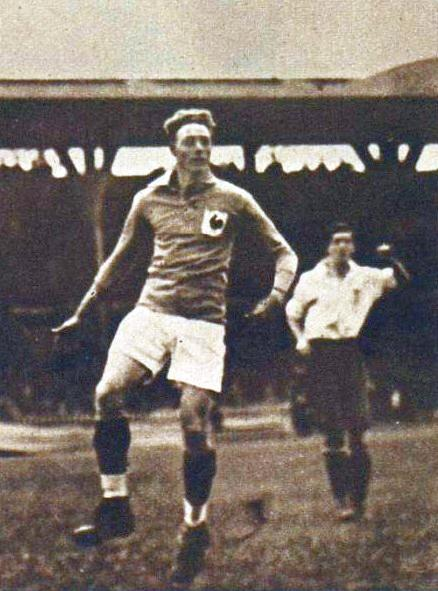 Marcel Domergue, capitaine de l'équipe de France de football en 1921.